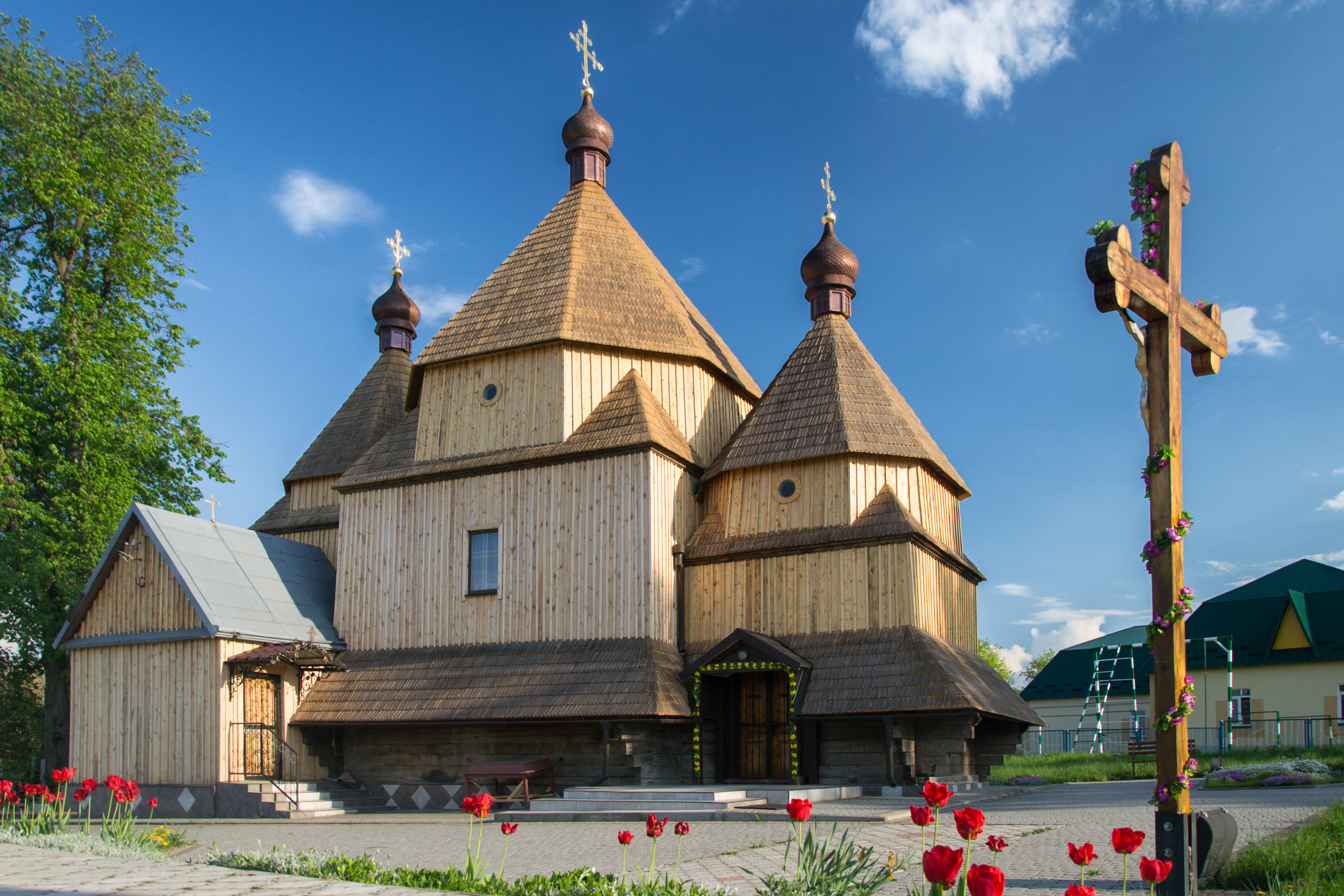 Церква Йоана Богослова, Скорики